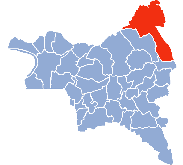 Auteur Hervé SUAUDEAU Licensing Catégorie:Cartes de Seine-saint-Denis